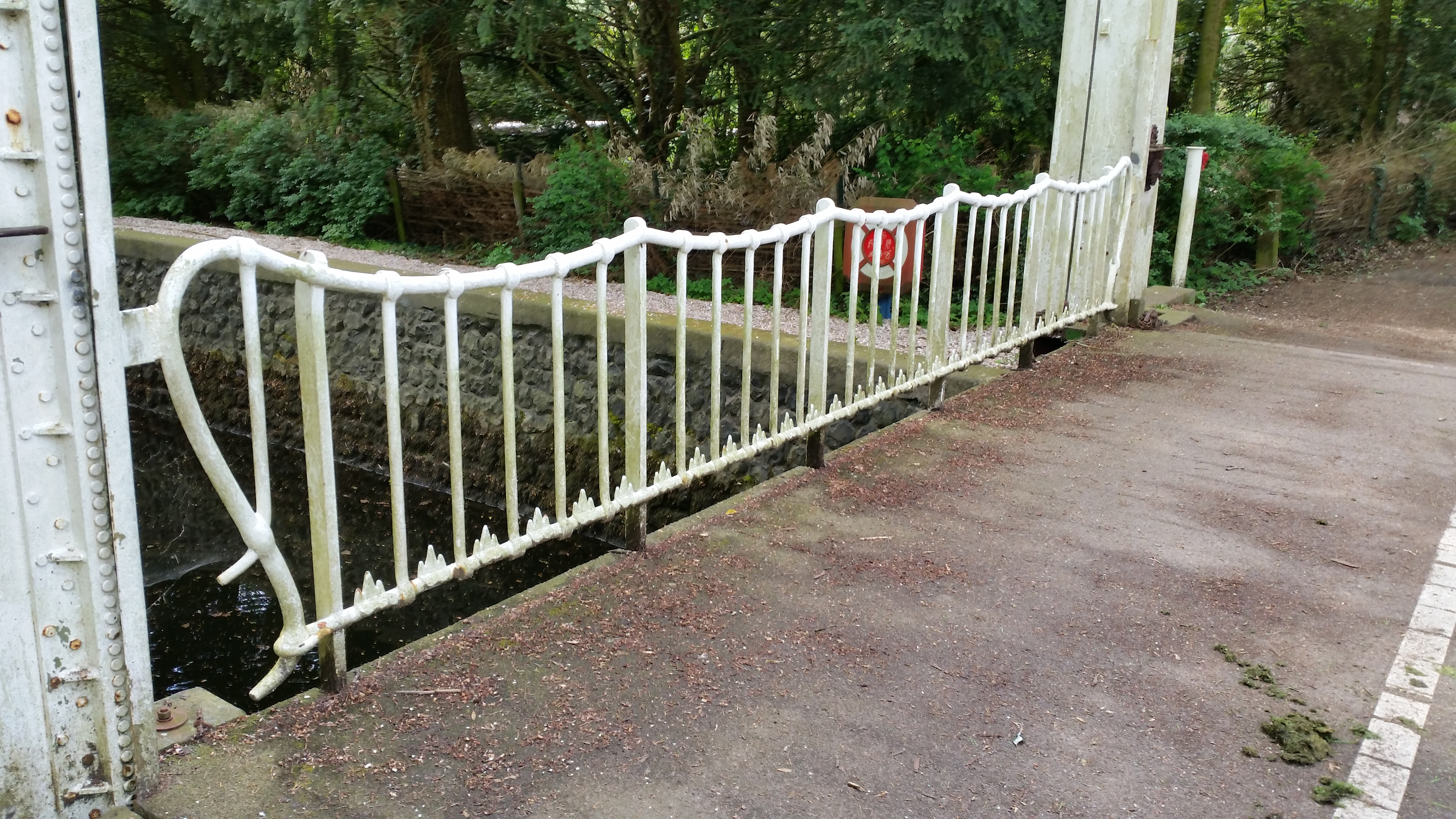 Leuning met S-motief op het eind, Brug 592 (in Amsterdam)